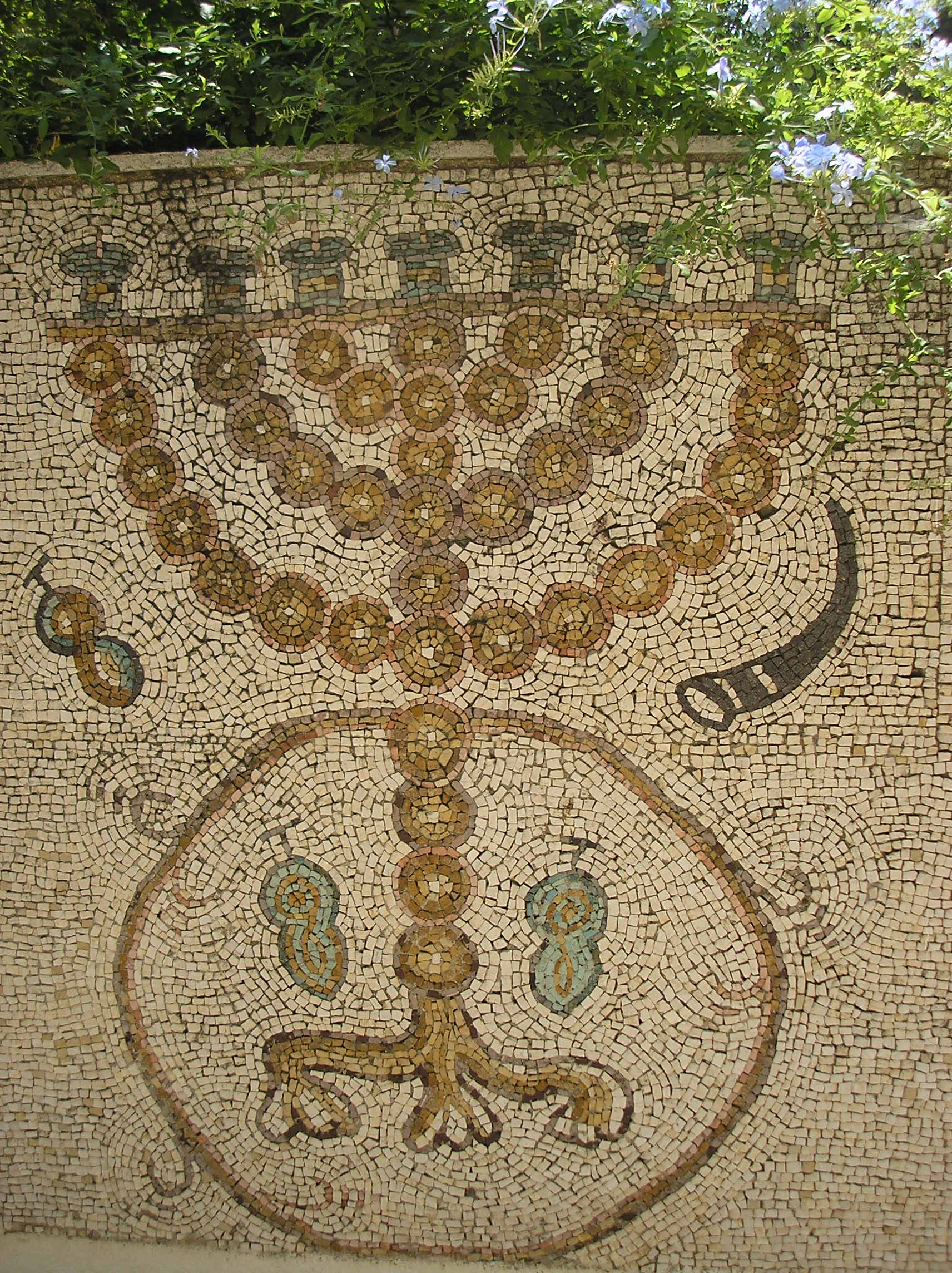 Maon Mozaic, Beit ben Zvi, Rehavia, Jerusalem